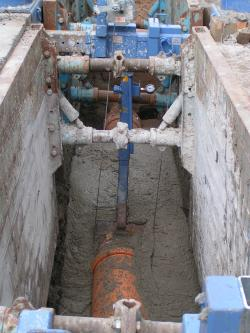 RSS Flüssigboden® in einem Rohrgraben